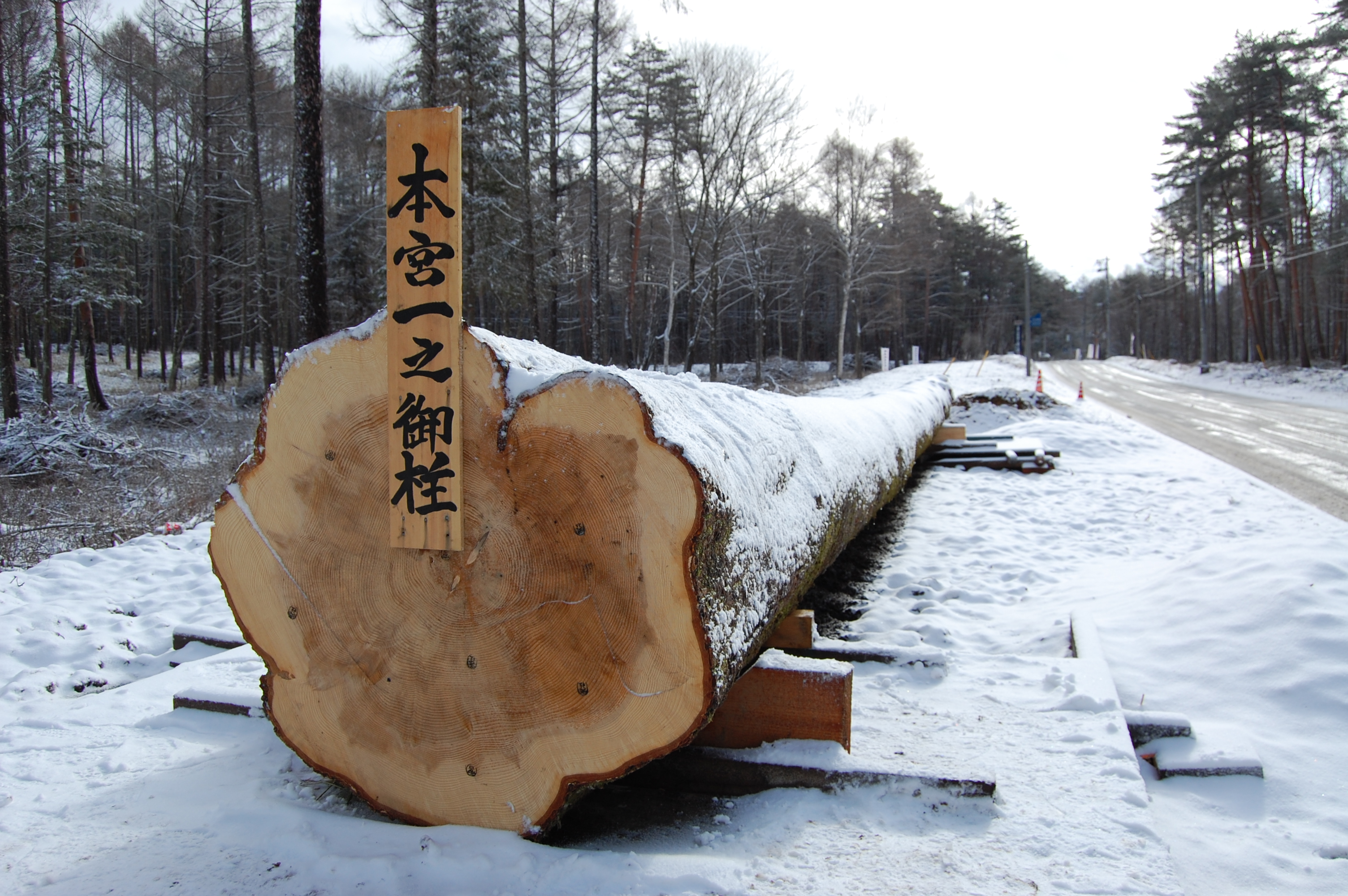 御柱祭 御神木